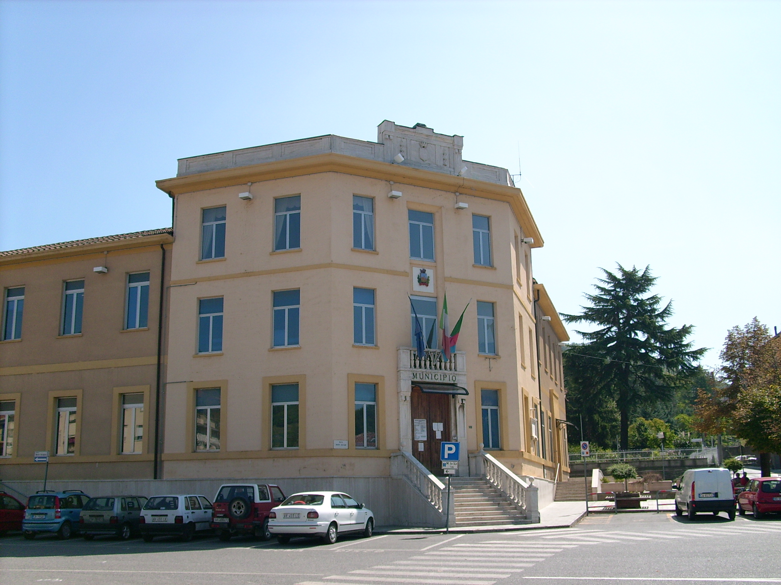 Municipio di Cengio, Liguria, Italia